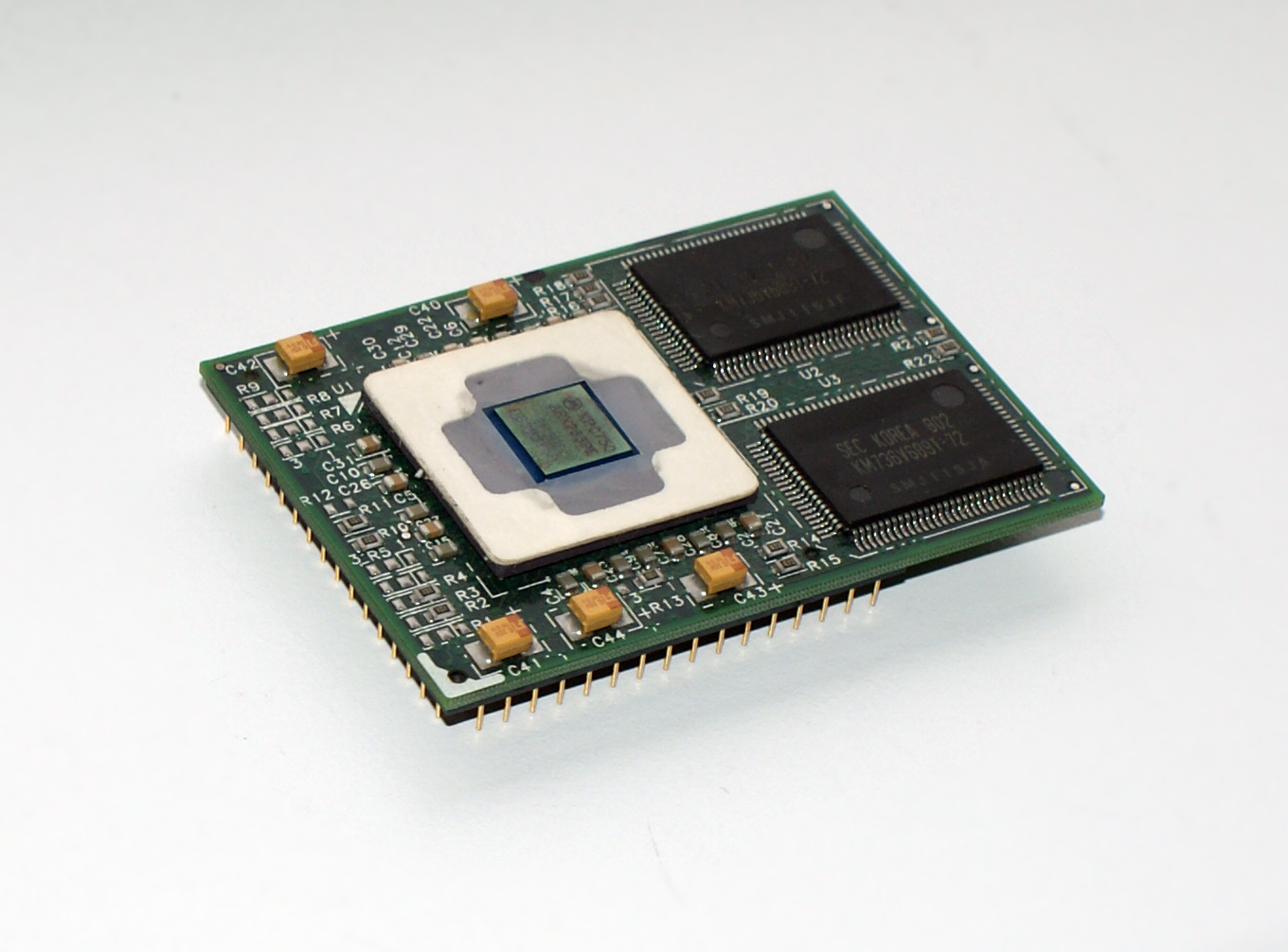 Mikroprozessor von Motorola vom Typ XPC750ARX266PE